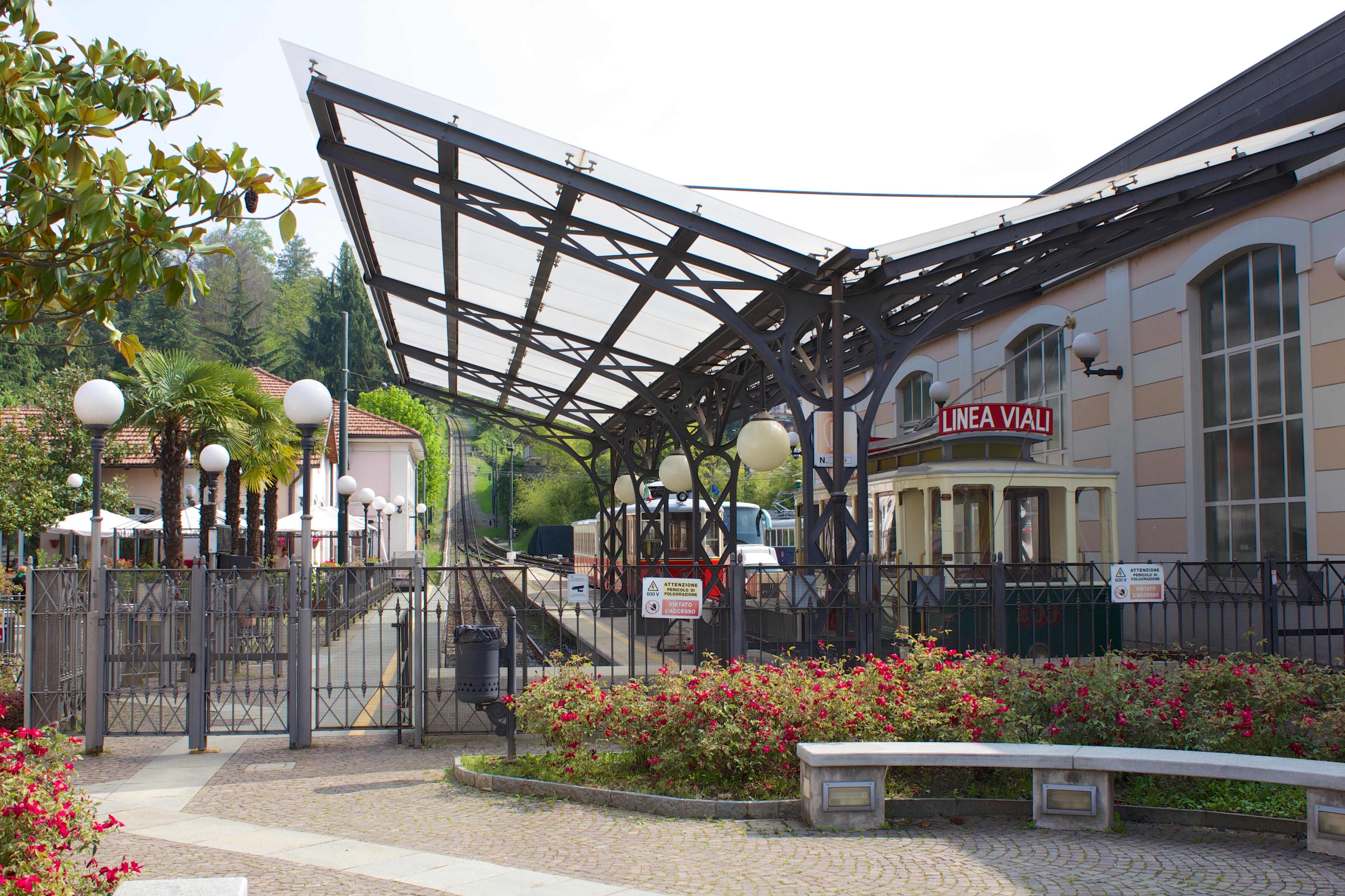 Tranvia Sassi-Superga, stazione di Sassi